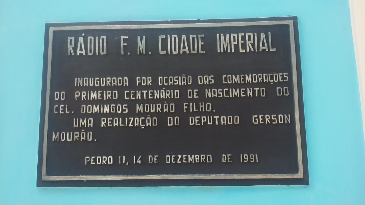 Placa na parede de fora da Rádio FM Cidade Imperial de Pedro II, no Piauí.